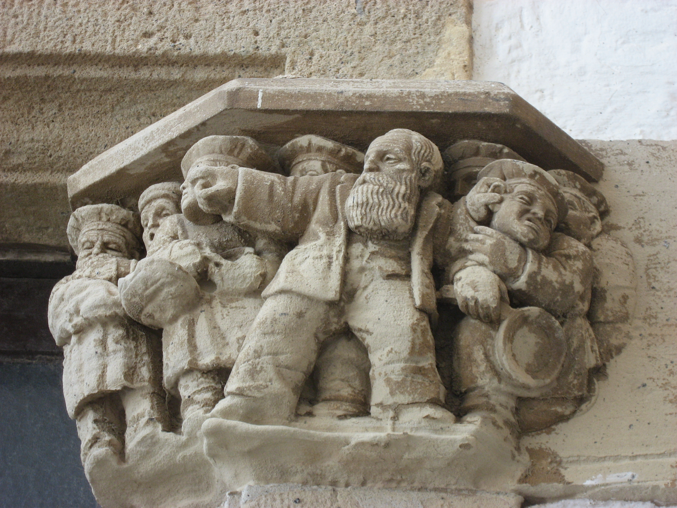 Capitell del Palau Maricel. Pere Jou escultor